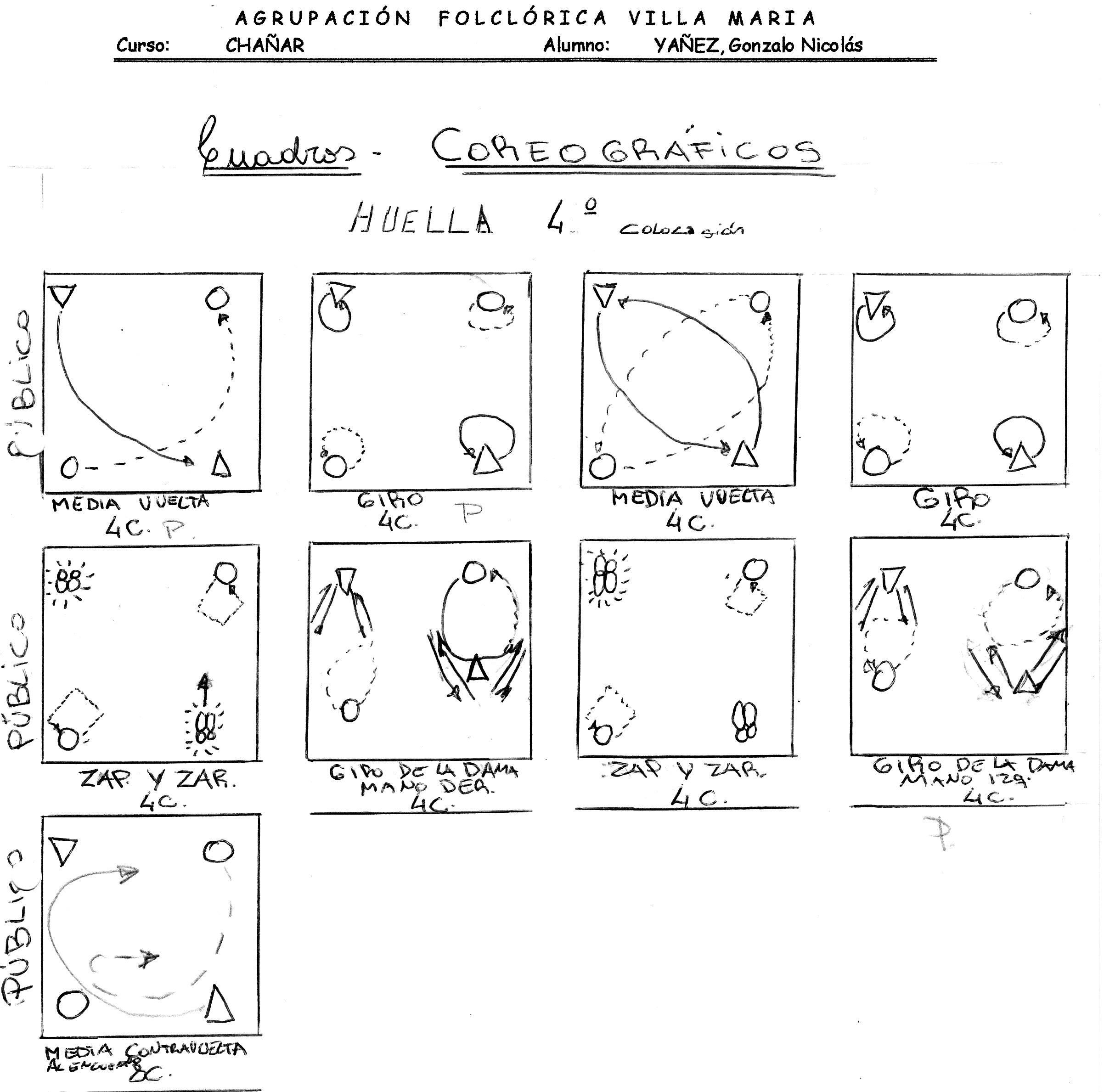 cuadros coreograficos